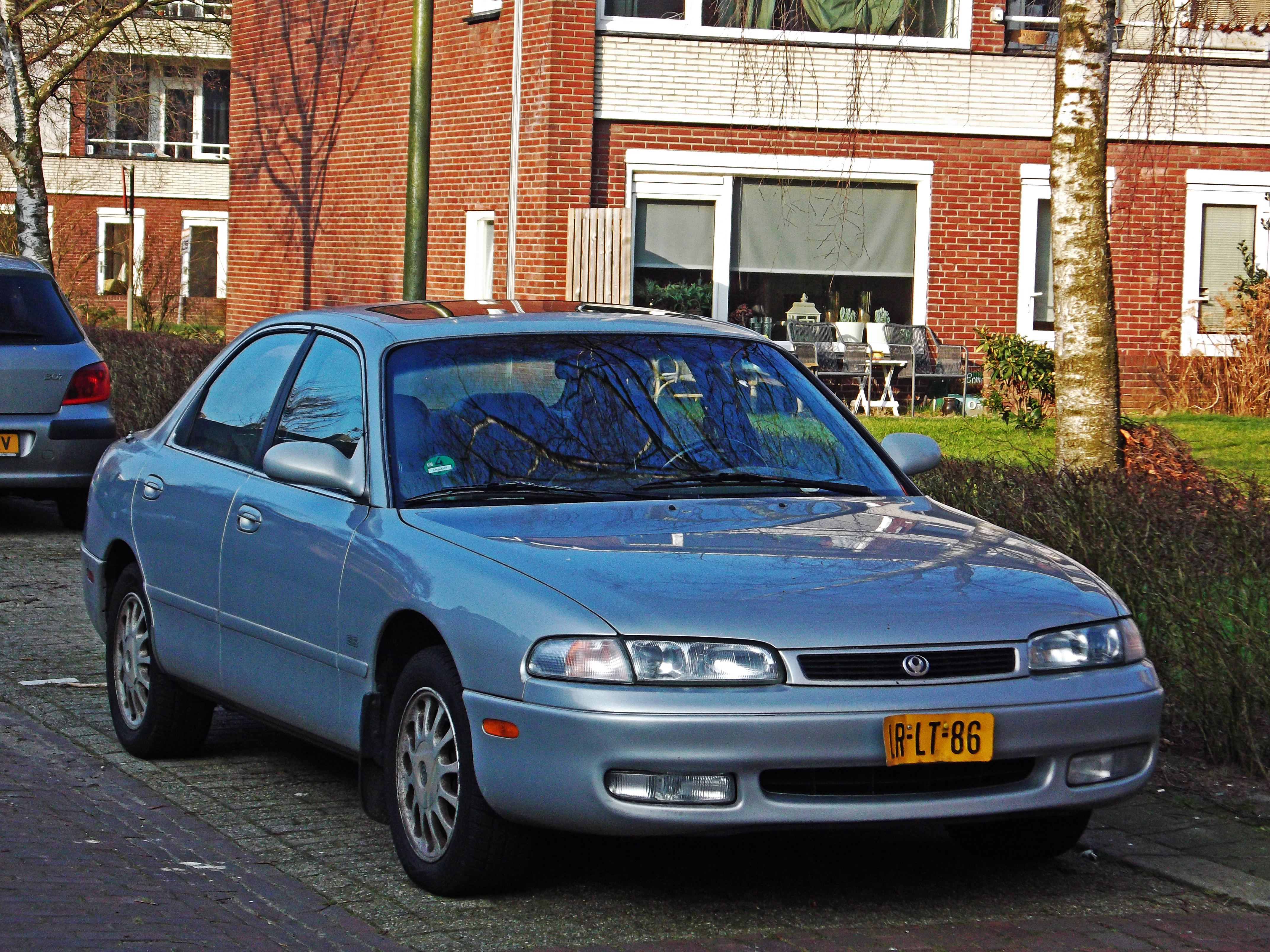 1993. US-spec.